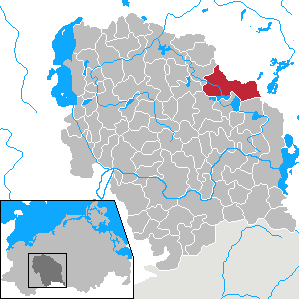 Dobbertin in Mecklenburg-Vorpommern - District Parchim